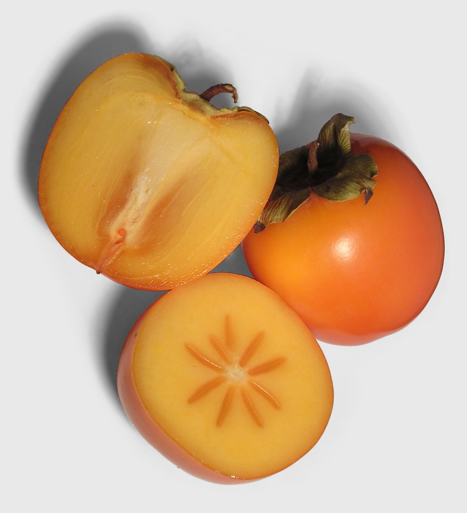 Persimmon